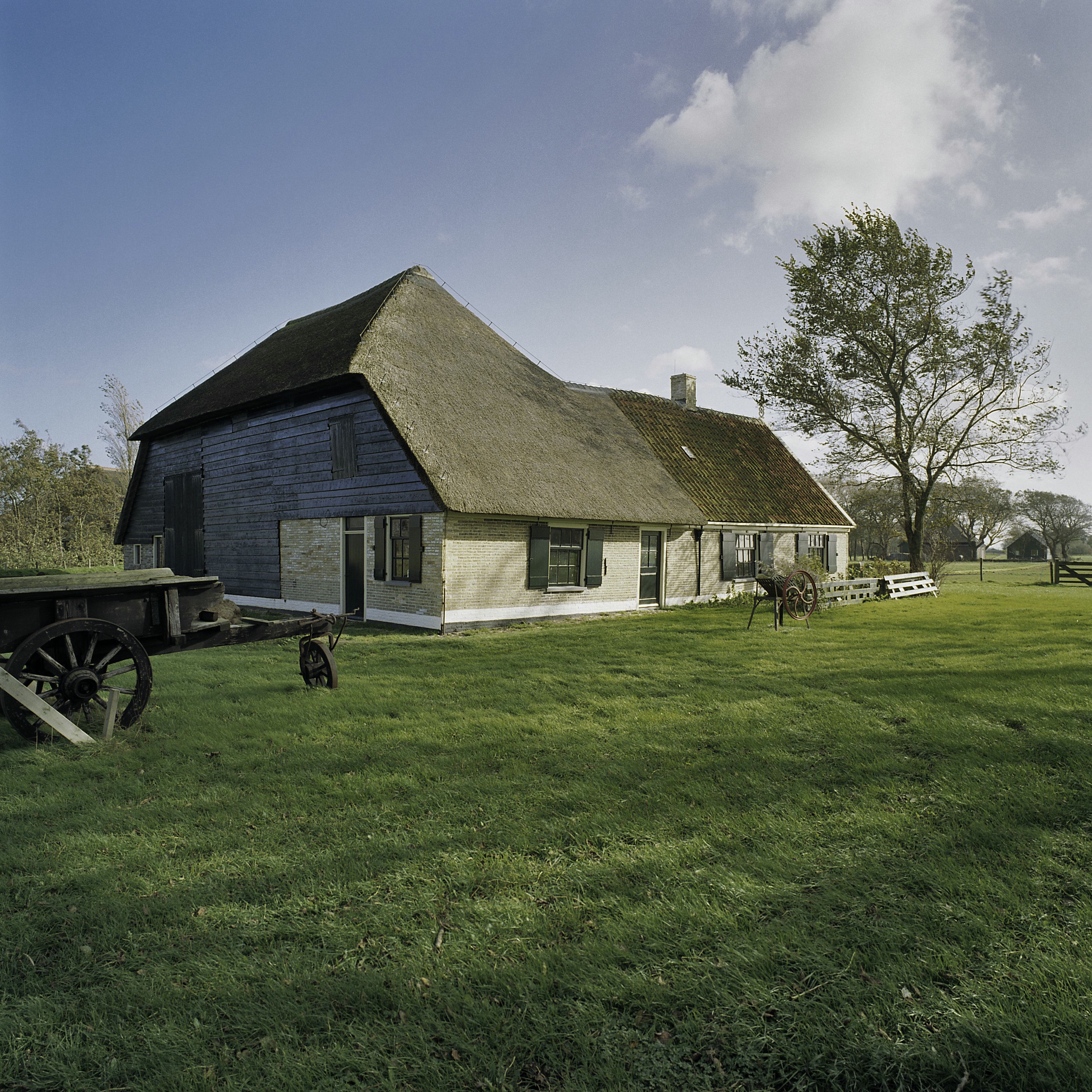 Boerderijen: Overzicht voorgevel boerderij (opmerking: Gefotografeerd voor Monumenten In Nederland Noord-Holland)